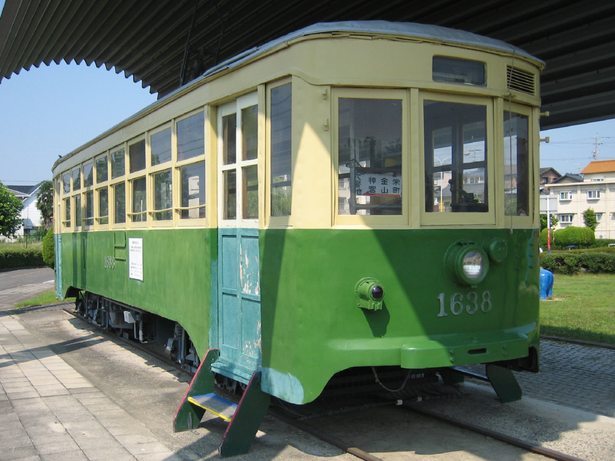 名古屋市交通局1600形電車の1638号。かつて春日井市交通児童館で保存されていた（現在撤去済）。